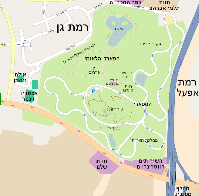 דרום תל אביב